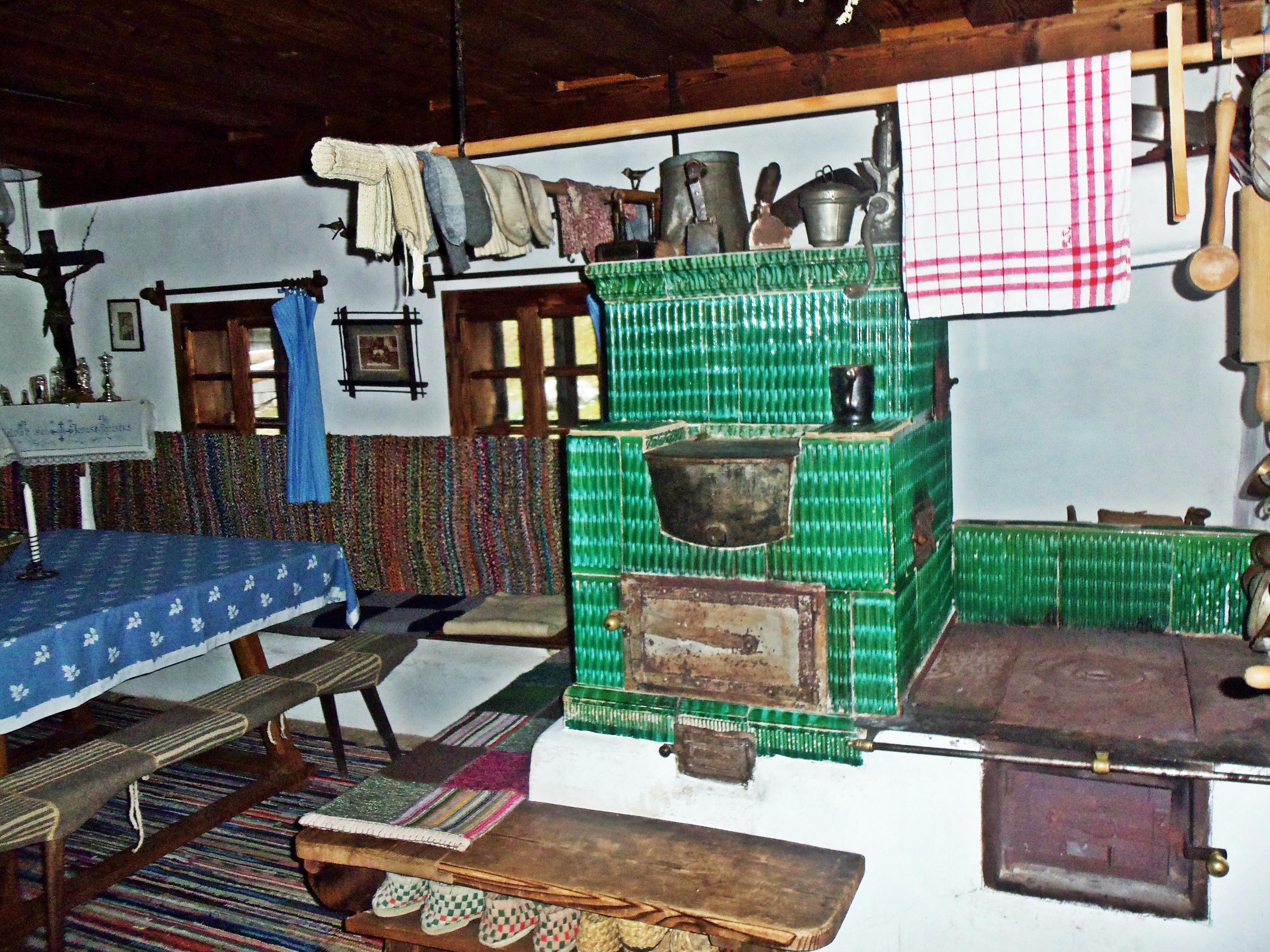 Heimathaus Stube